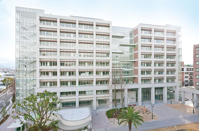 摂南大学の校舎